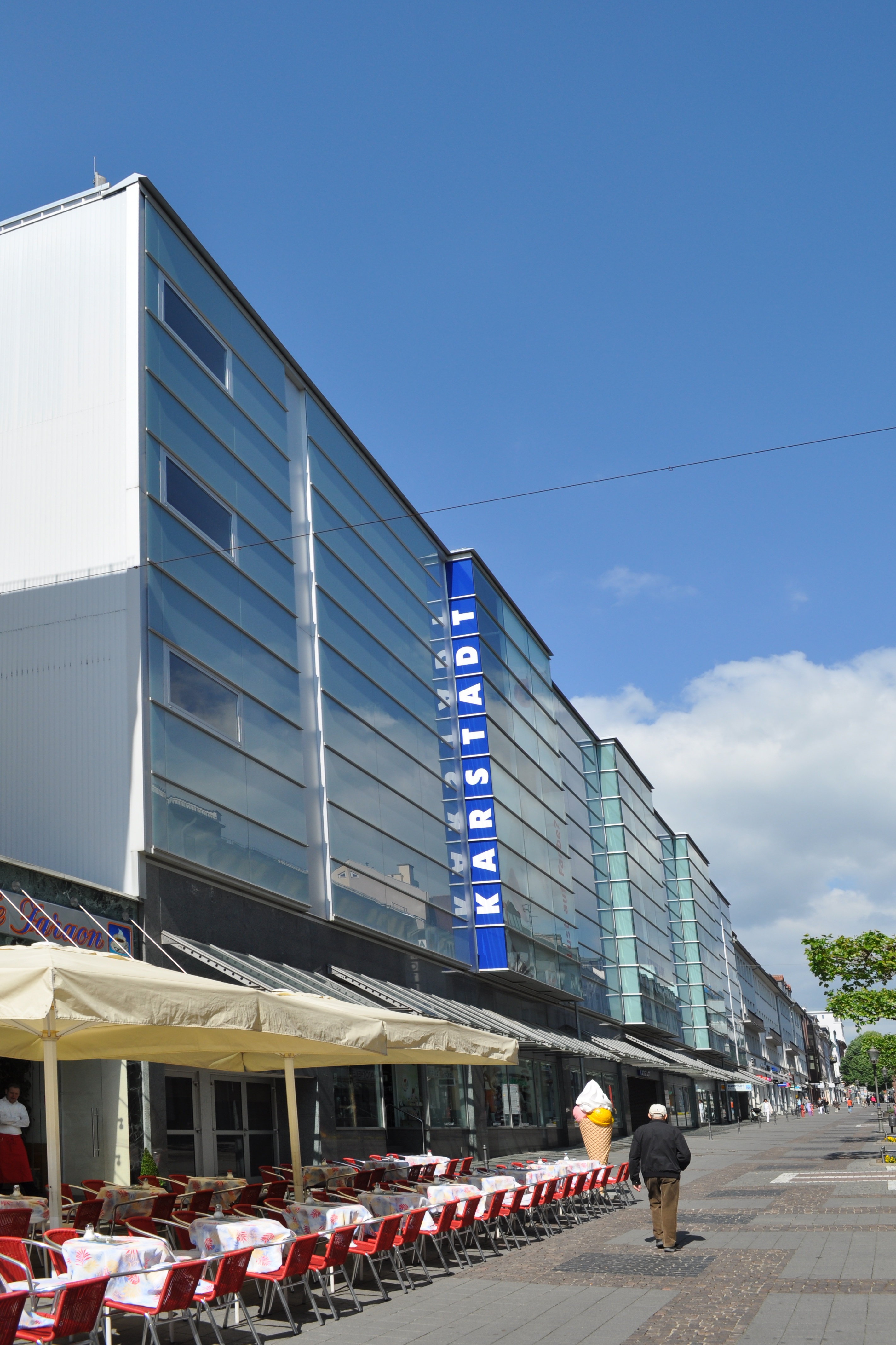 Bad Homburg, Louisenstraße, Karstadt